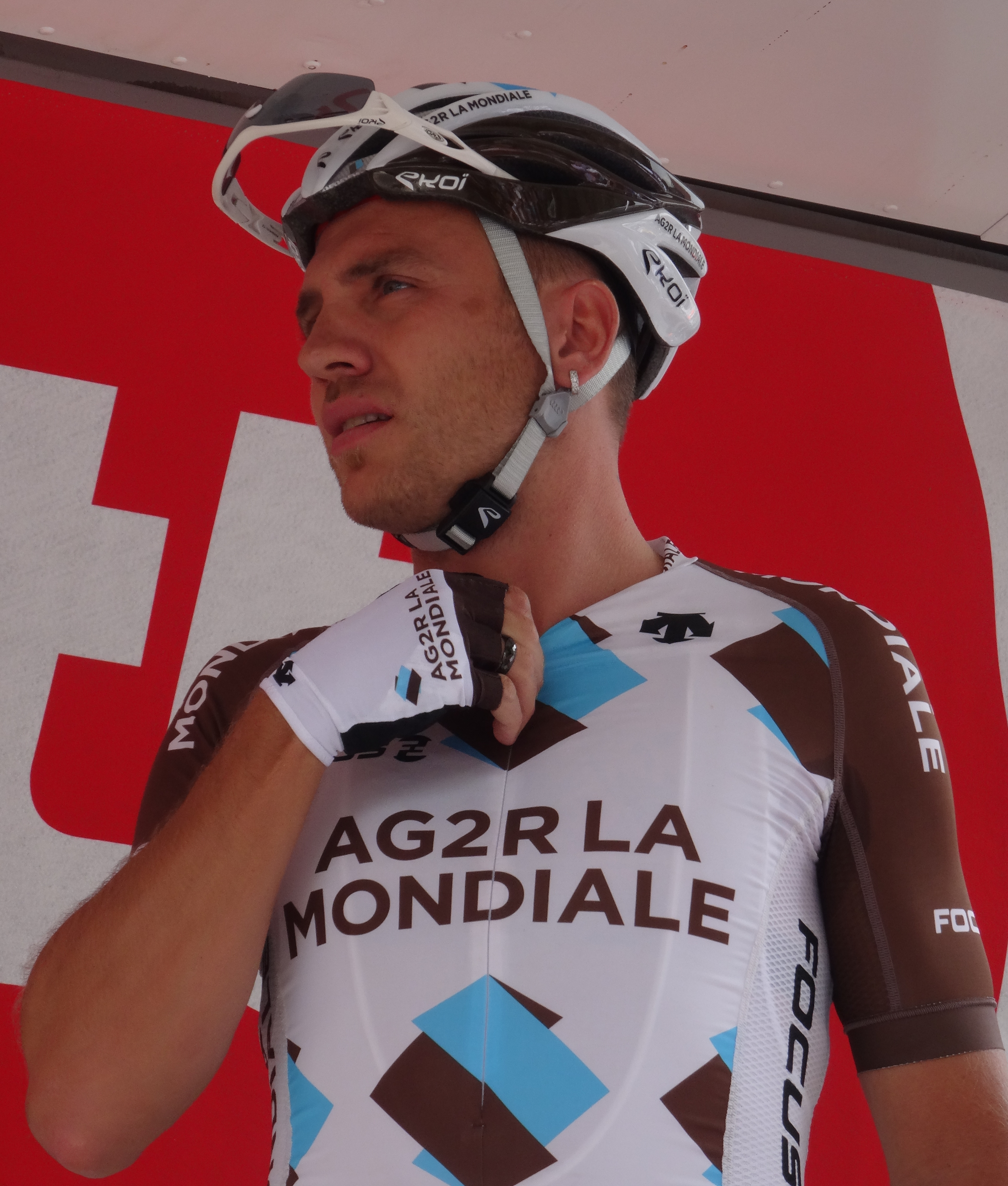 Reportage photographique réalisé le samedi 26 juillet à l'occasion du départ de la première étape du Tour de Wallonie 2014 à Frasnes-lez-Anvaing, Belgique.